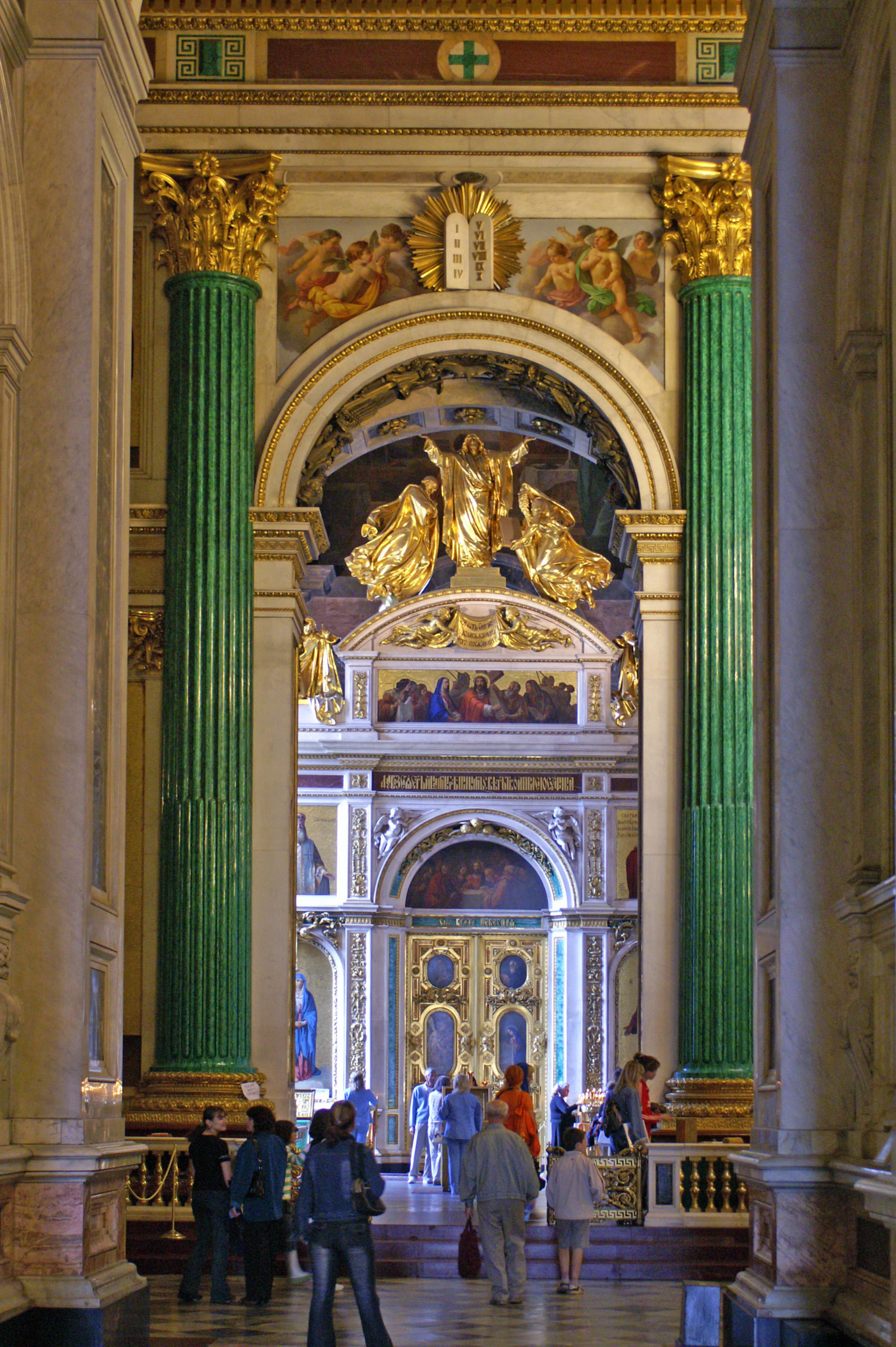 Sankt Petersburg. Isaakskathedrale